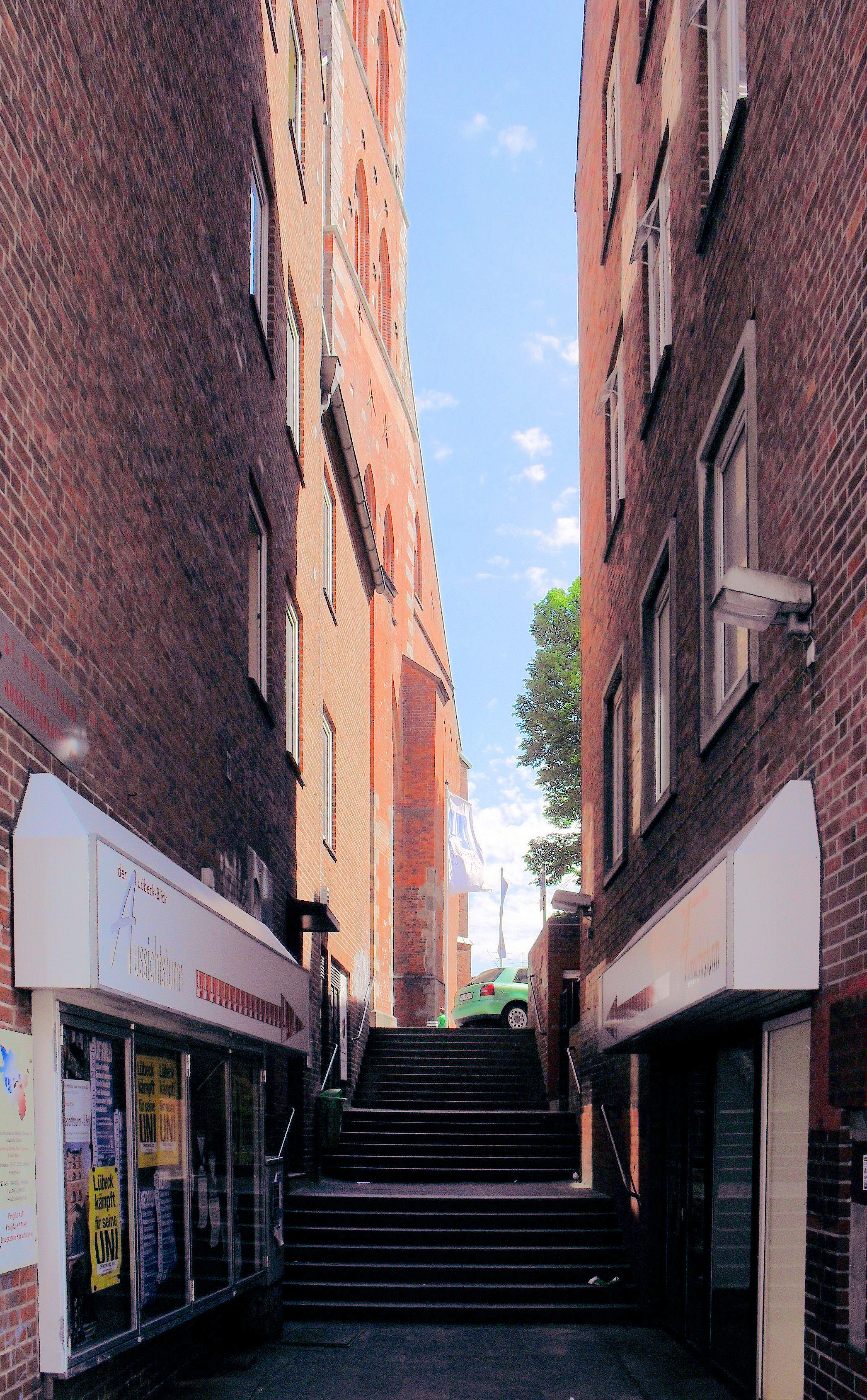 Der heutige Petristegel in Lübeck